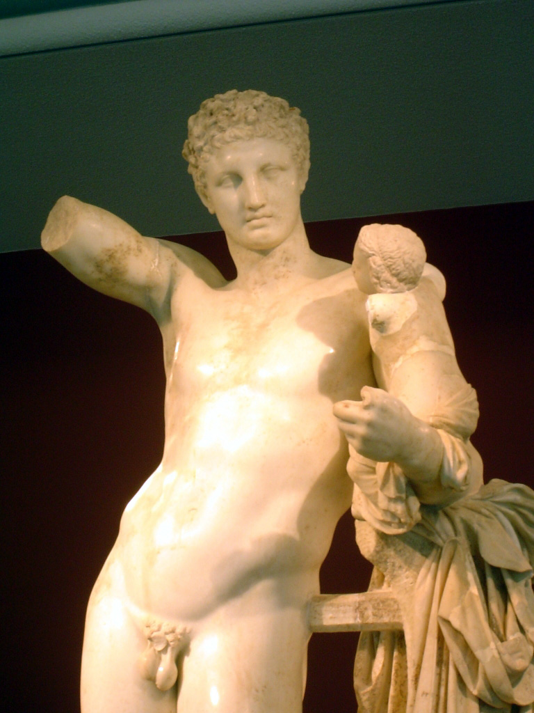 Hermes des Praxiteles, Museum von Olympia, Griechenland